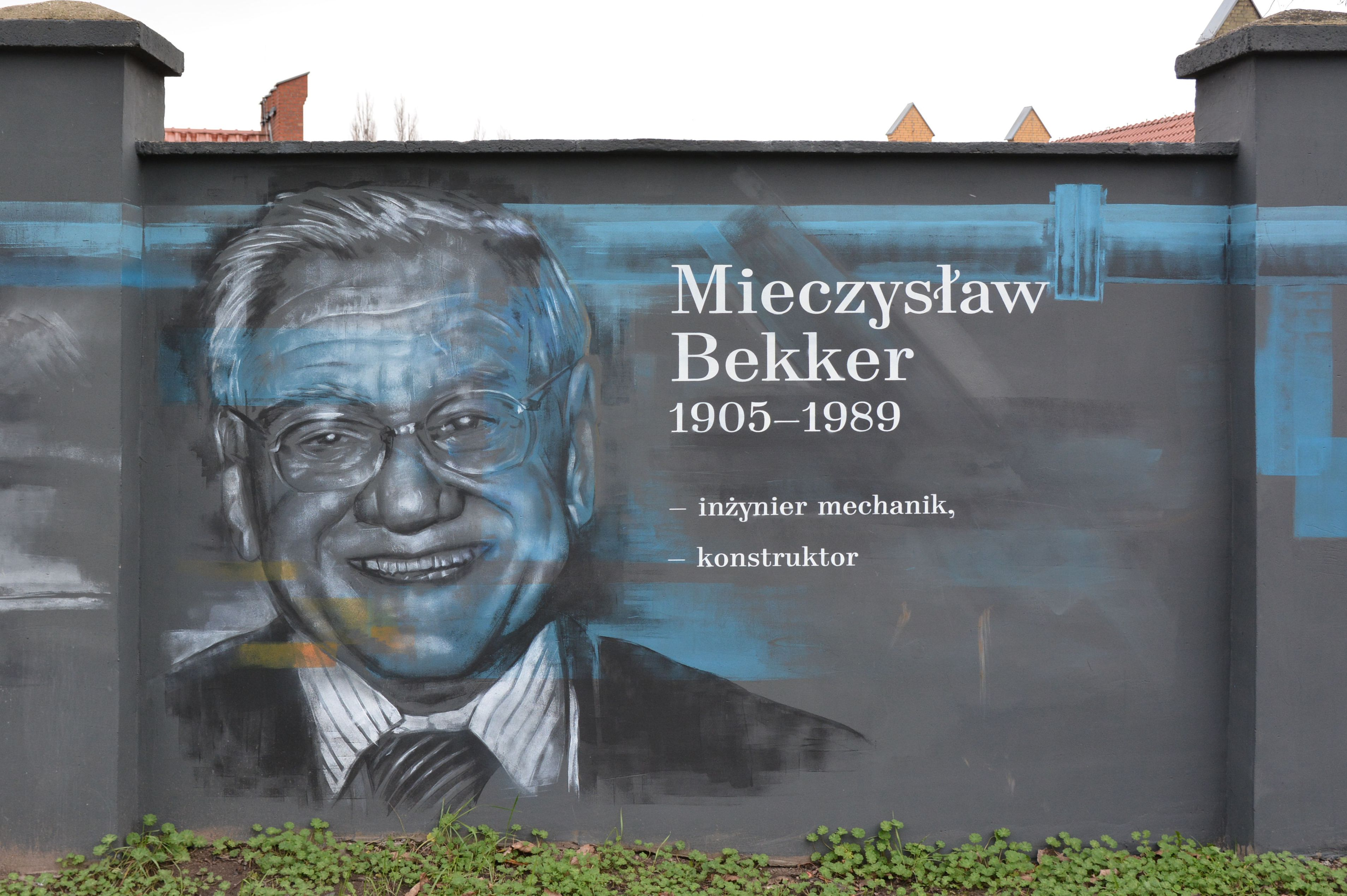 Mieczysław Bekker - fragment muralu przy ul. Chmielewskiego w Szczecinie